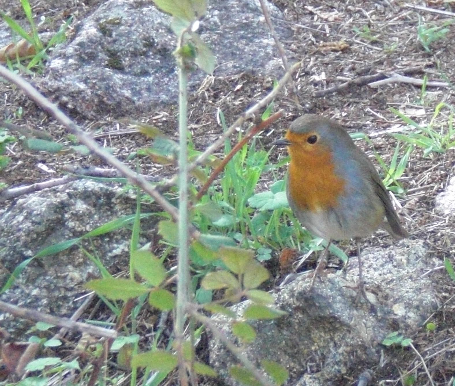 ruĝgorĝulo